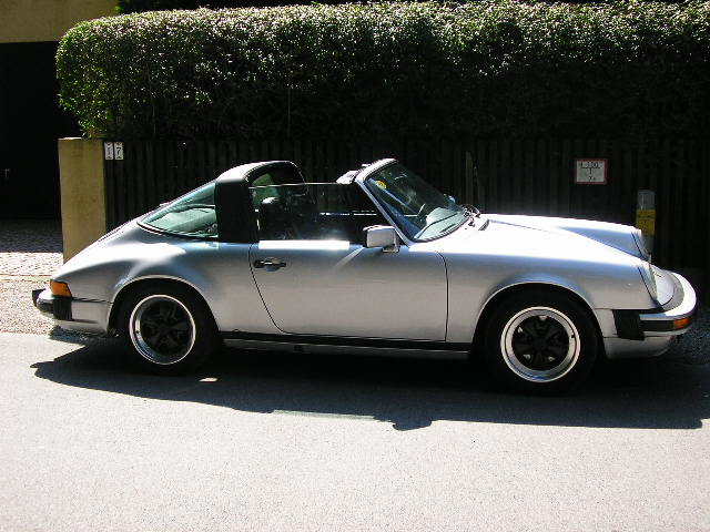 Porsche 911 Targa Baujahr 1980